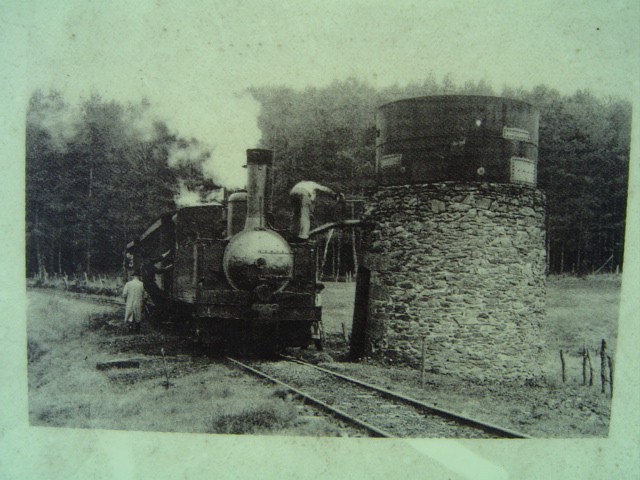 Le Transcorrézien, appelé familièrement le "Tacot" se ravitillant à la Citerne.